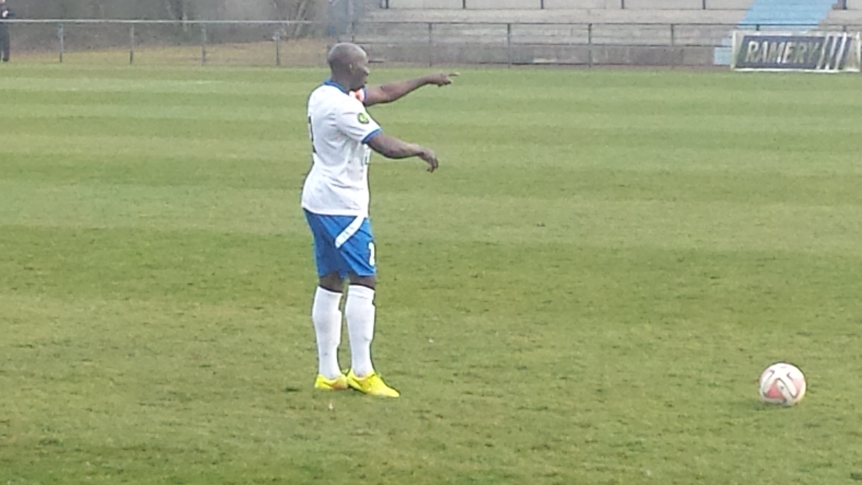 Moussa Sidibé, tirant un coup franc, lors du match Lens B - AS Beauvais, comptant pour la vingt-deuxième journée du championnat de CFA (quatrième division française), le 14 mars 2015.